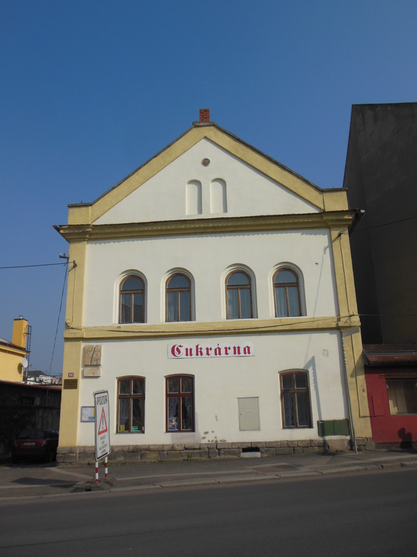 Kralupy nad Vltavou (okres Mělník). Bývalá synagoga v ulici S. K. Neumanna.